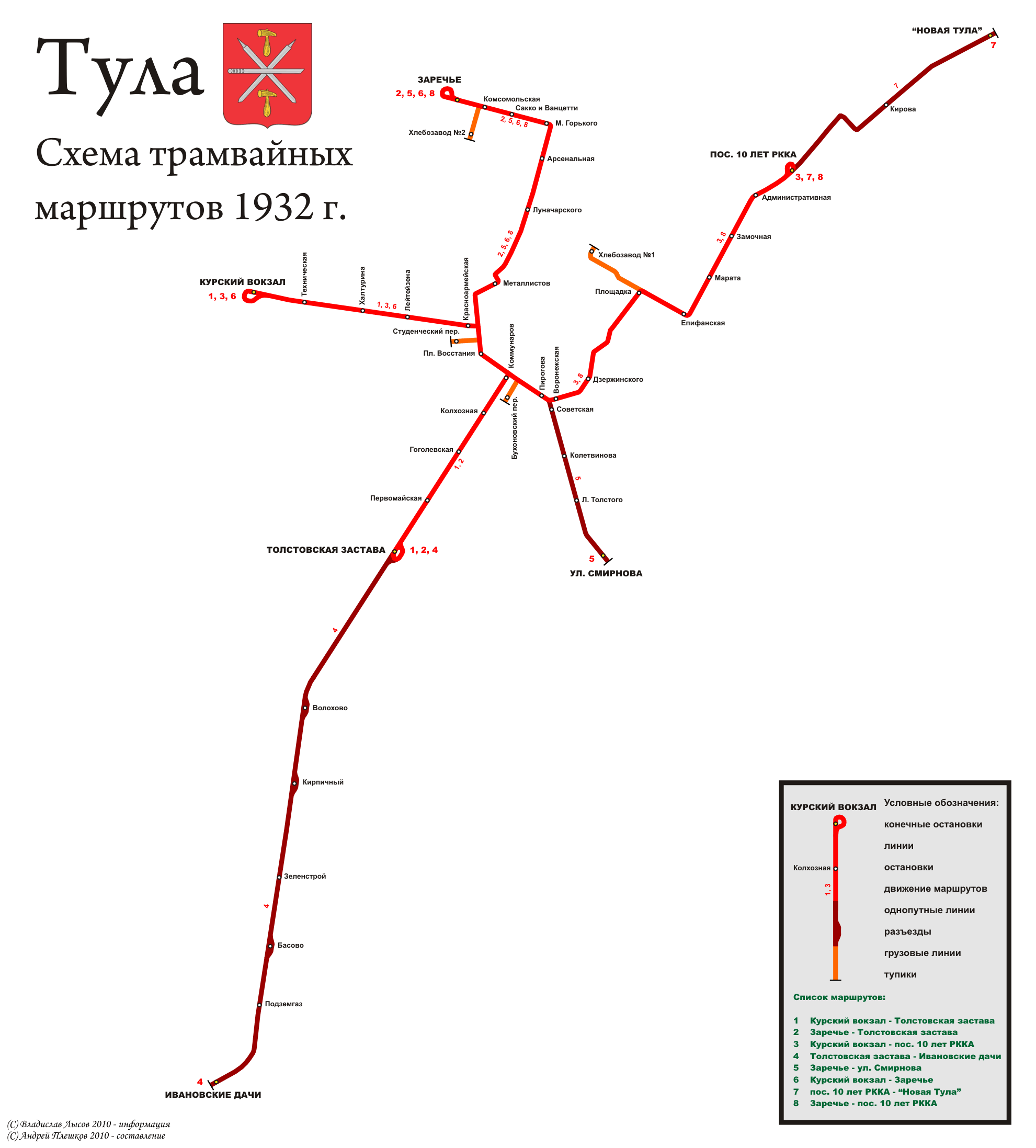 Схема тульского трамвая в 1932 году